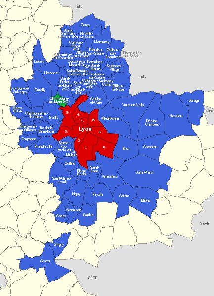 Communes du Grand Lyon, en vert Champagne-au-Mont-d'Or